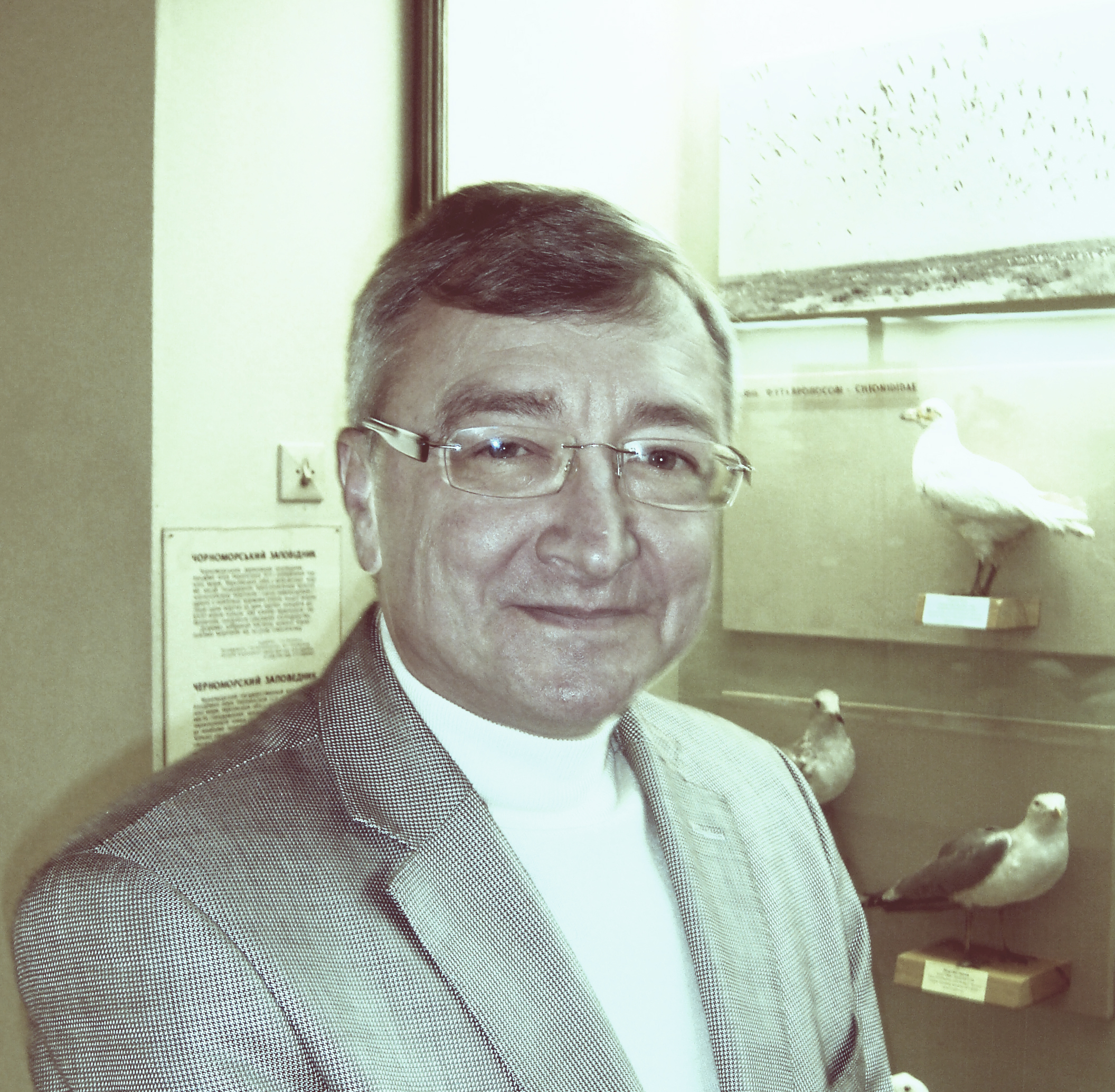 Борис Александров, чл.-кор. НАНУ в ННПМ